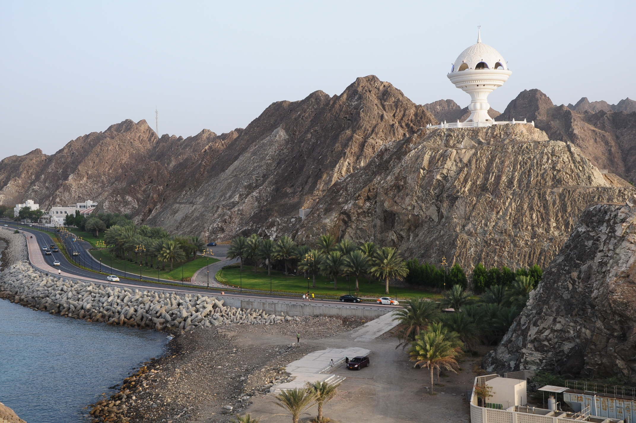 Riyam Park in Muscat, Oman.